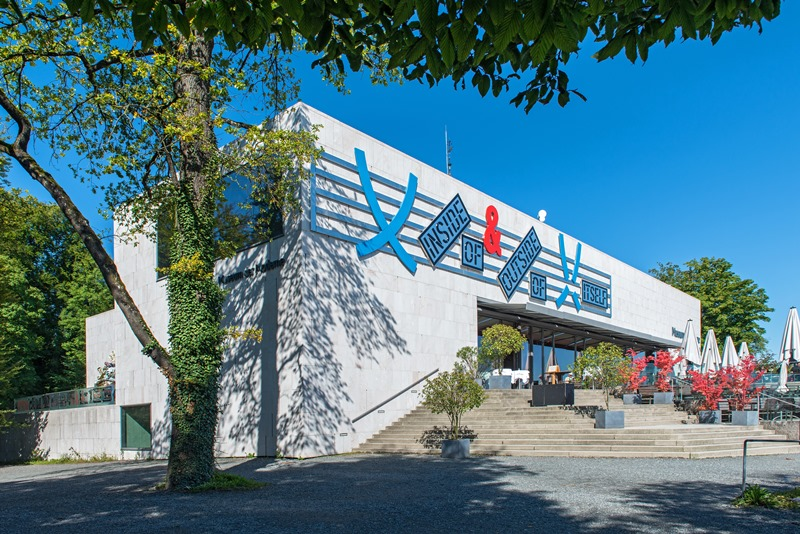 Die Fassade des Museum der Moderne Salzburg auf dem Mönchsberg, September 2017.